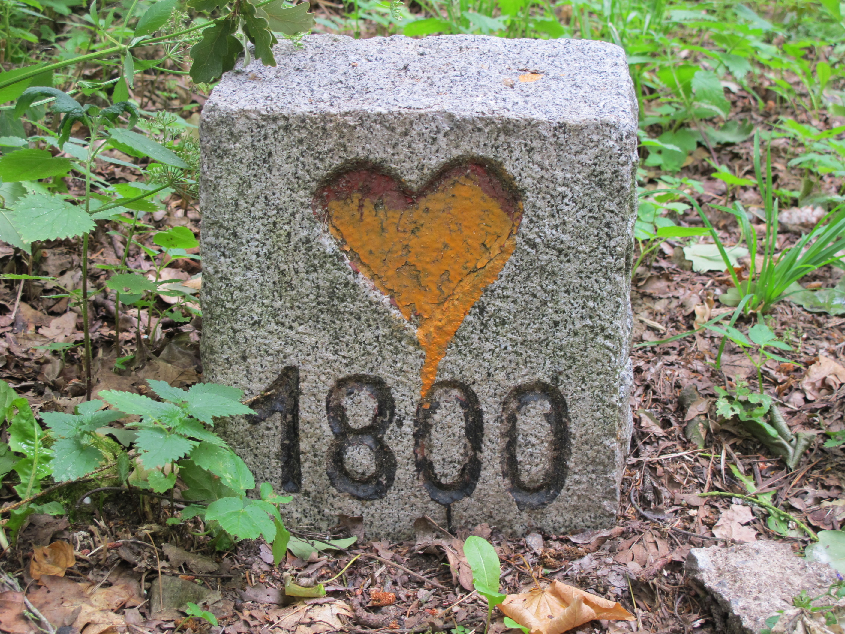 Wegmarkierung im Kurpark